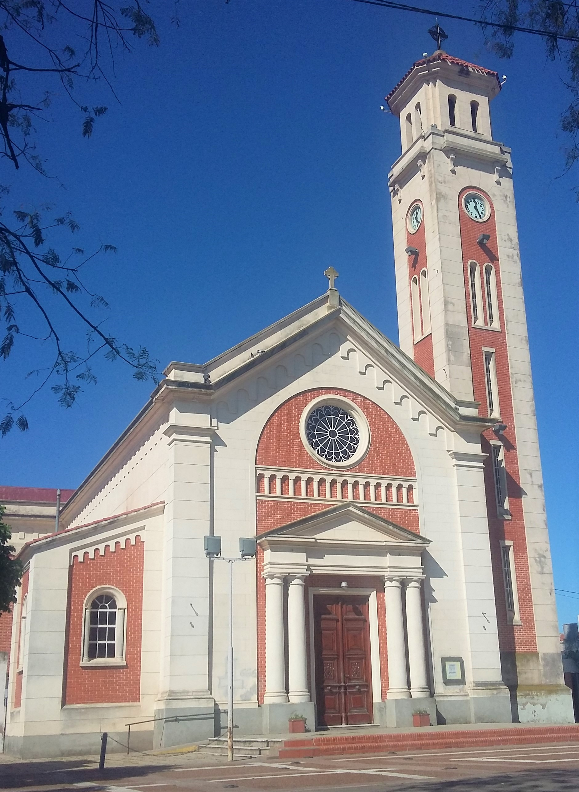 Iglesia matriz o templo parroquial de Nuestra Señora de La Merced.